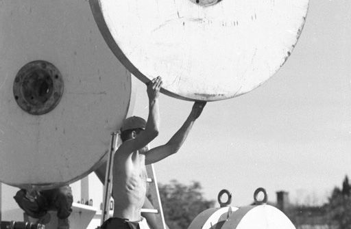 Jahrmarkt